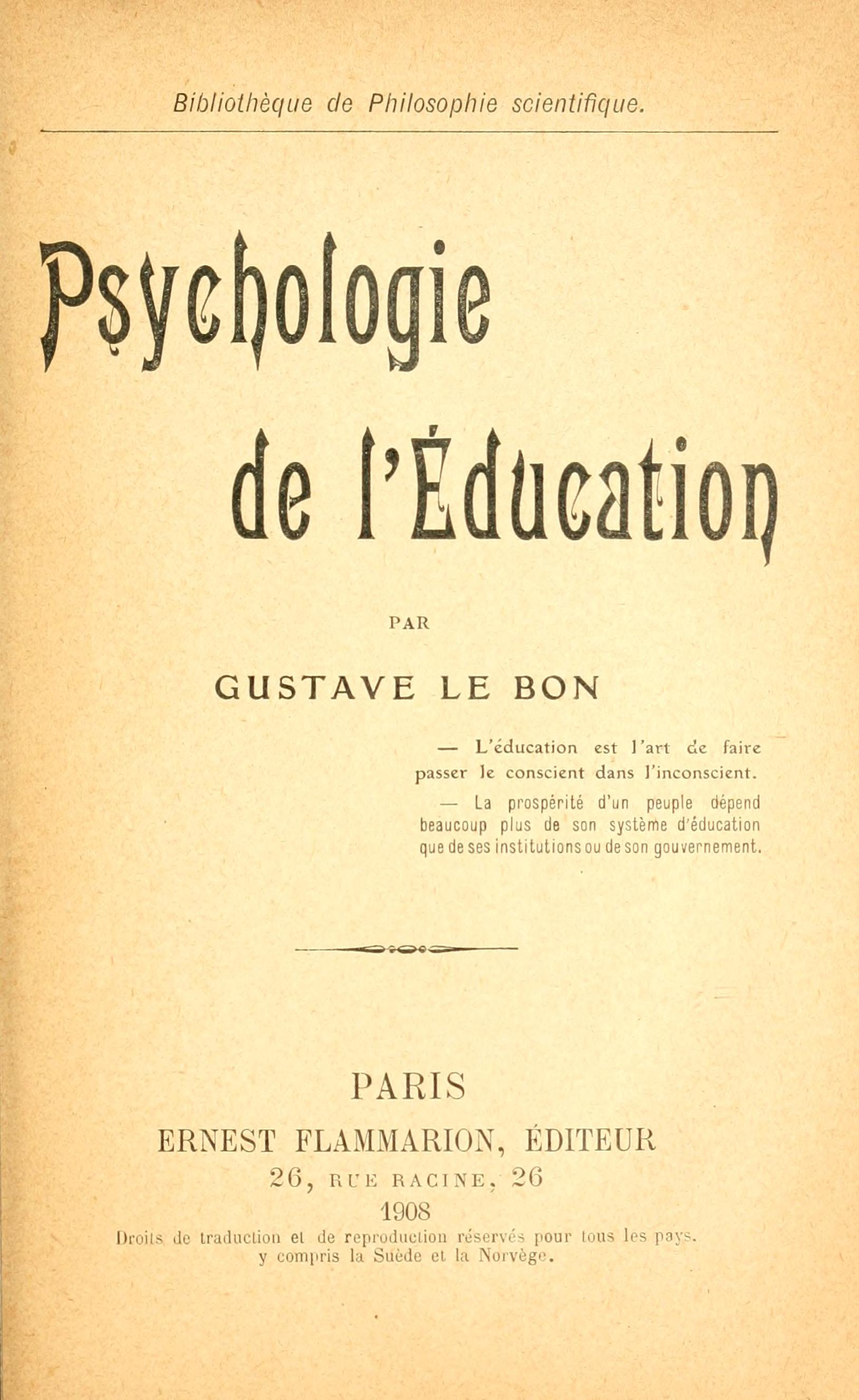 Титульная страница книги Лебона "Психология воспитания" 9 издания 1908 года.